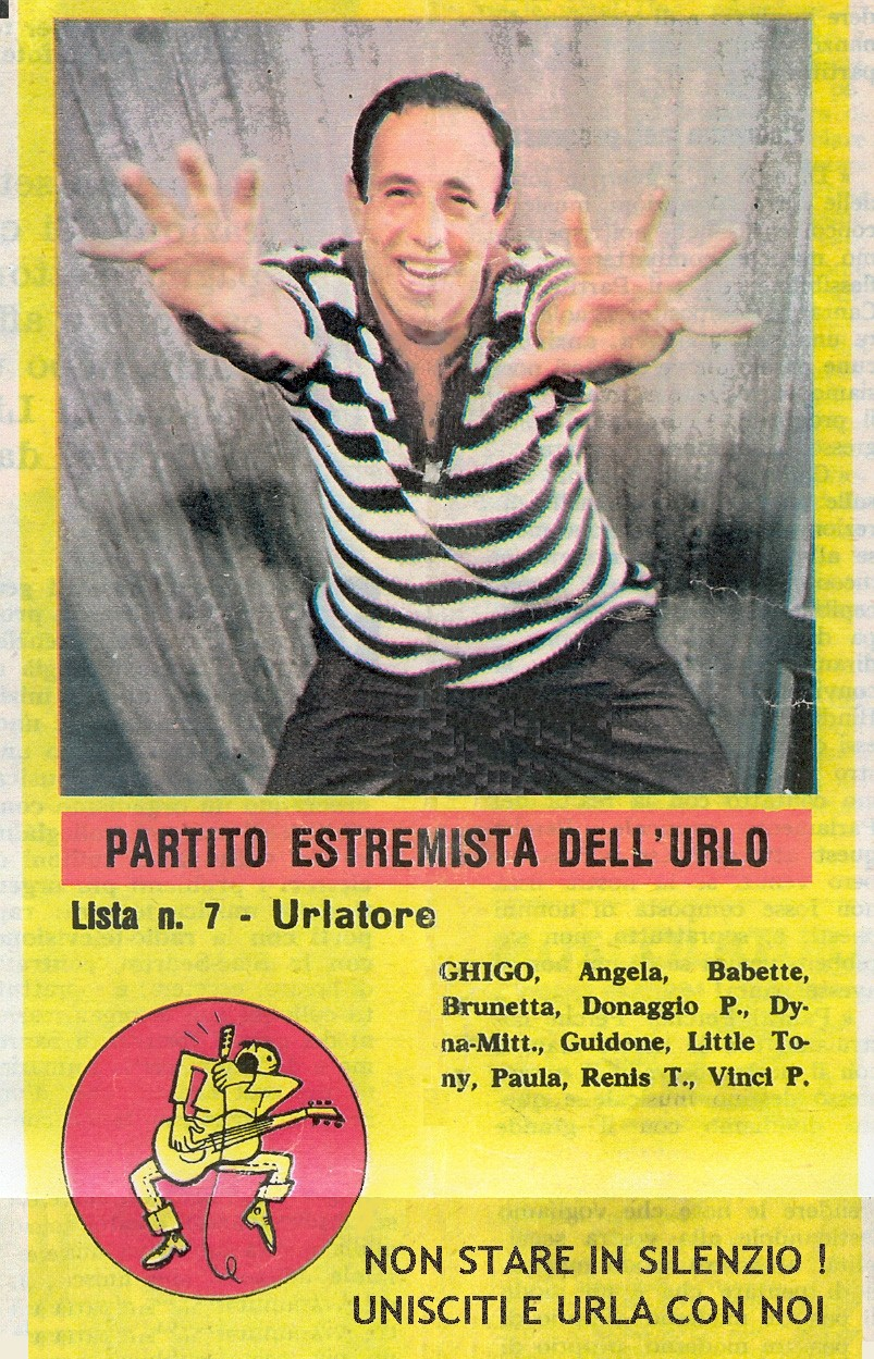 manifesto del 1960 che pubblicizza il seguito di urlatori iscritti al partito estremista di Ghigo Agosti